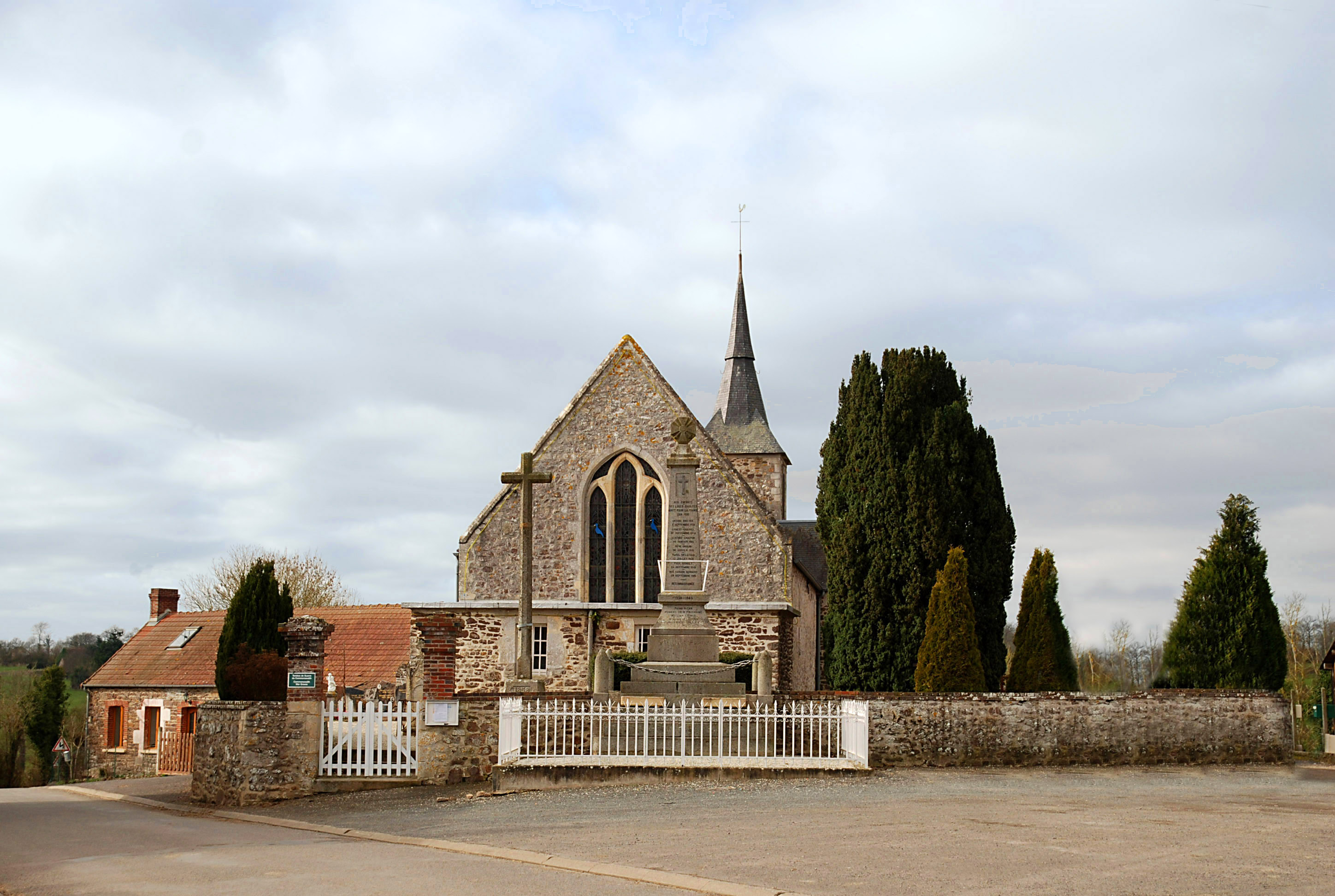 Les Loges-Saulces (Calvados)